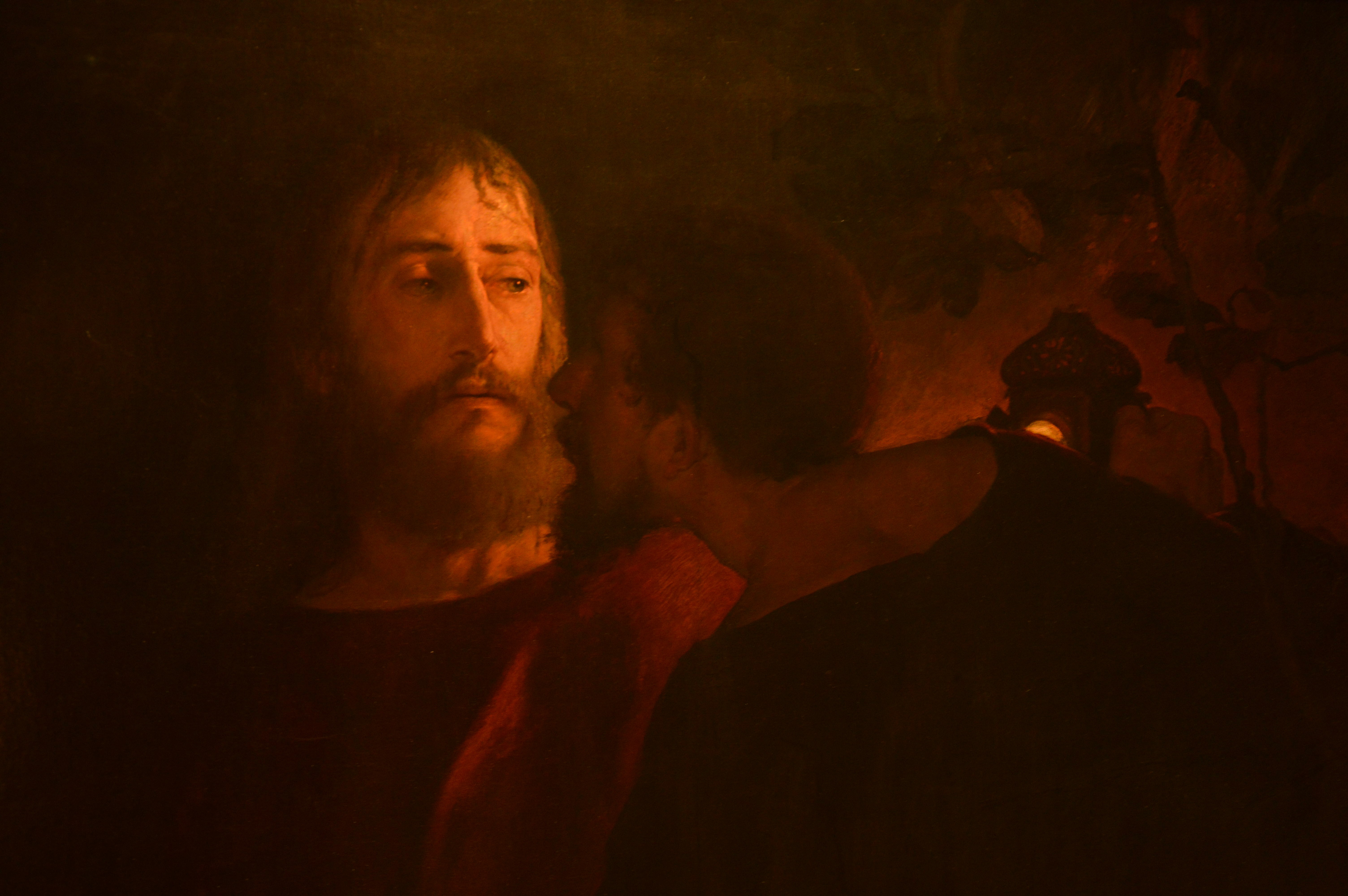 Judas Iscariot